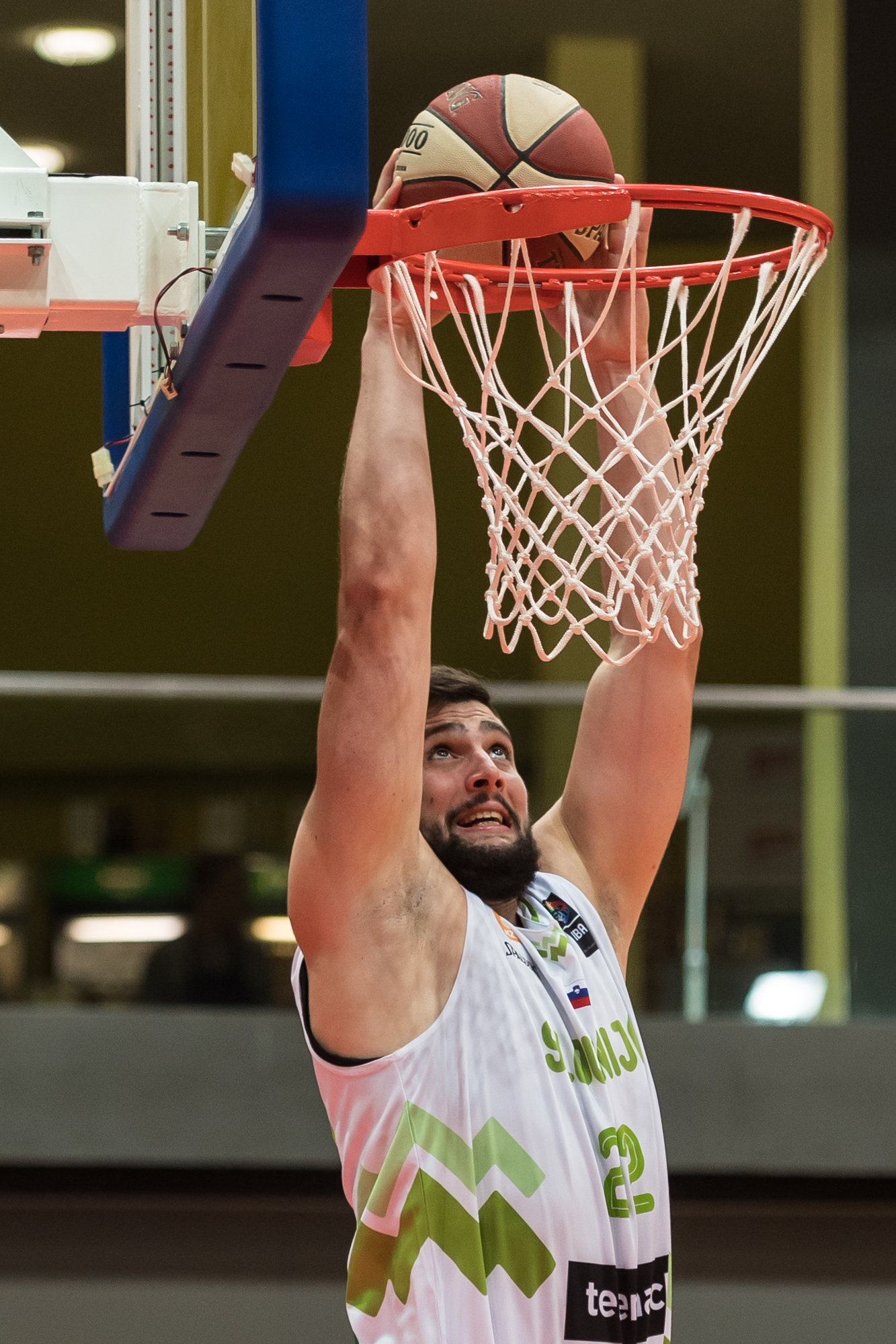 ÖBV Vier-Nationen-Turnier vom 12.-14. August 2016 in Schwechat: Slowenien vs Polen. Bild zeigt Ziga Dimec (SLO).